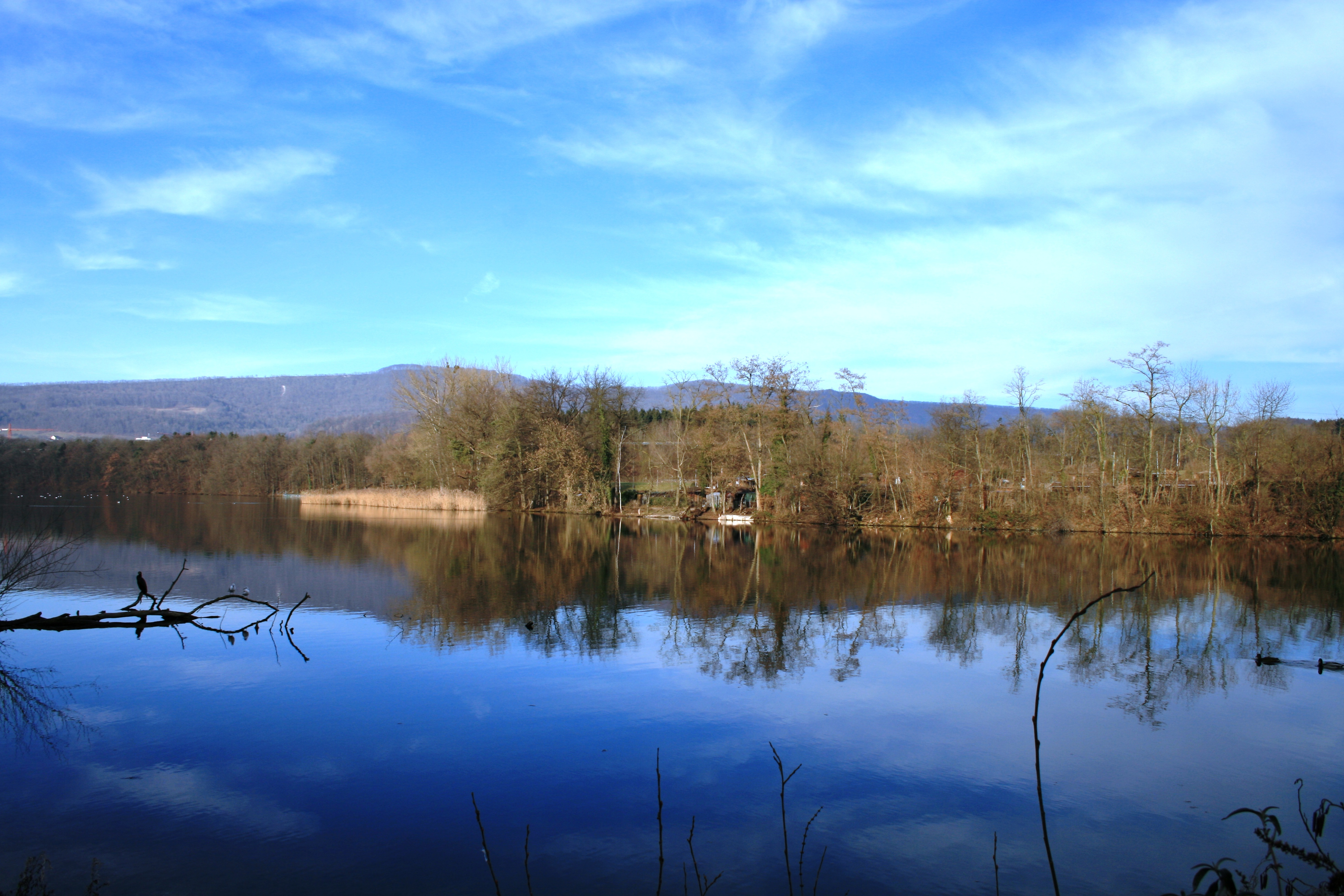 Stausee Wettingen, im Hintergrund die Lägern